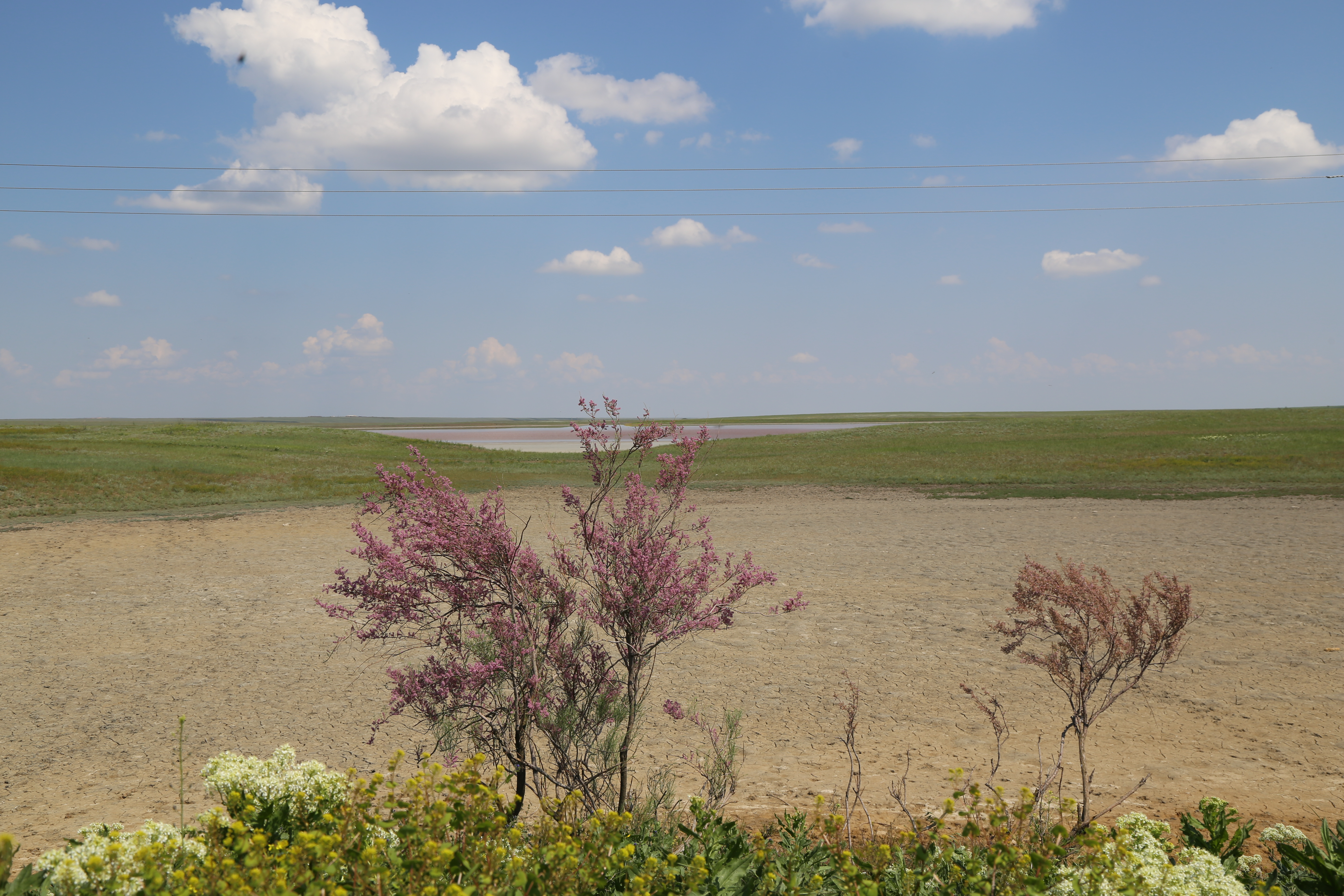 Ростовский заповедник: в центральной части Кума-Манычской впадины, к северу от оз. Маныч-Гудило, в Орловском и Ремонтнеском районах Ростовской области,Орловский район, Ростовская область This image is related to the protected area of Russia number 6100108